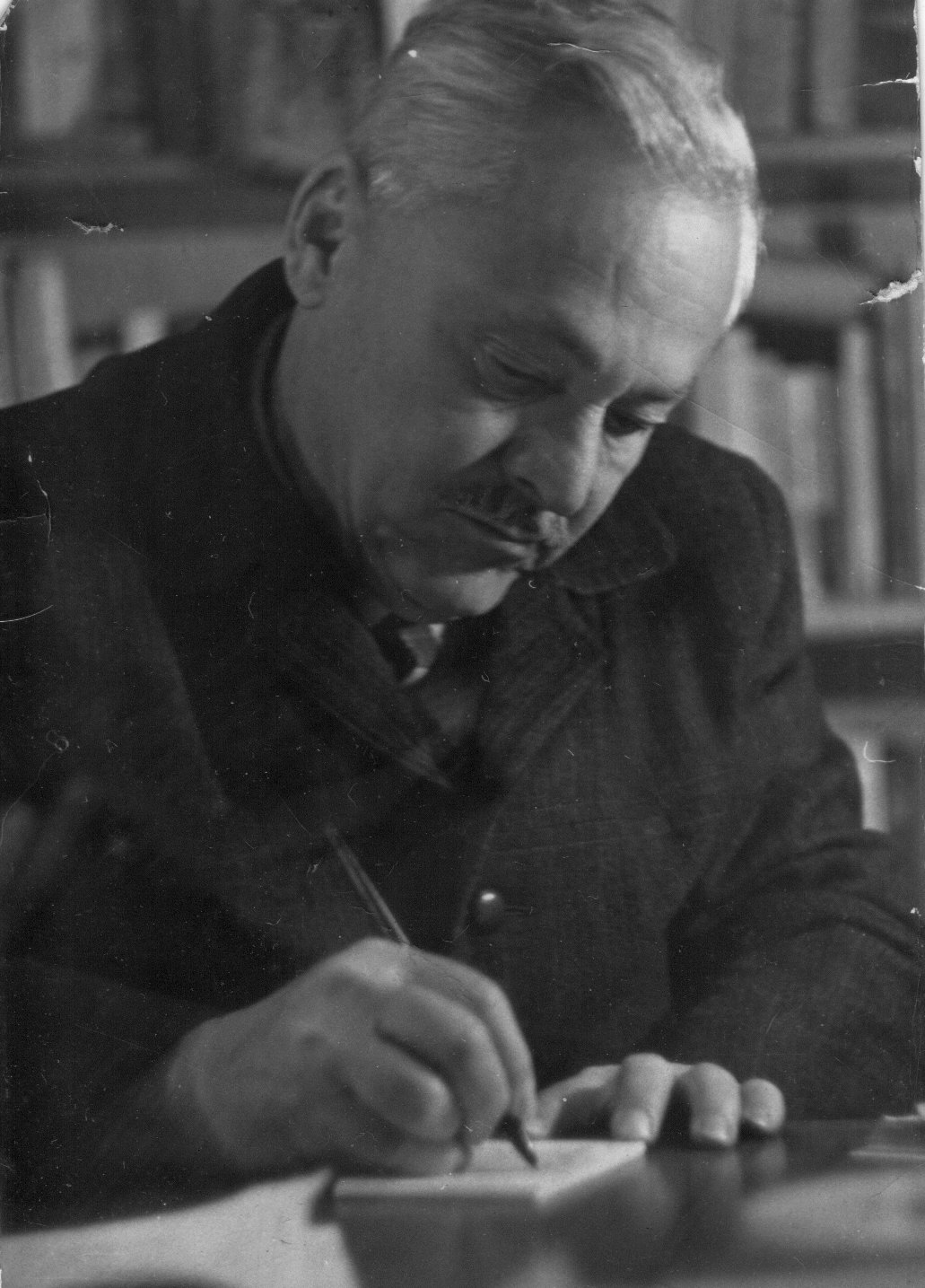 Fotografía de Miguel Angel Menéndez Reyes. Tomada en Odontología 5, Copilco, México D.F. Cámara de Oscar Menéndez el año de 1968, precisamente durante el movimiento estudiantil. Propiedad del material y del Archivo por RAMM (Comvaser)